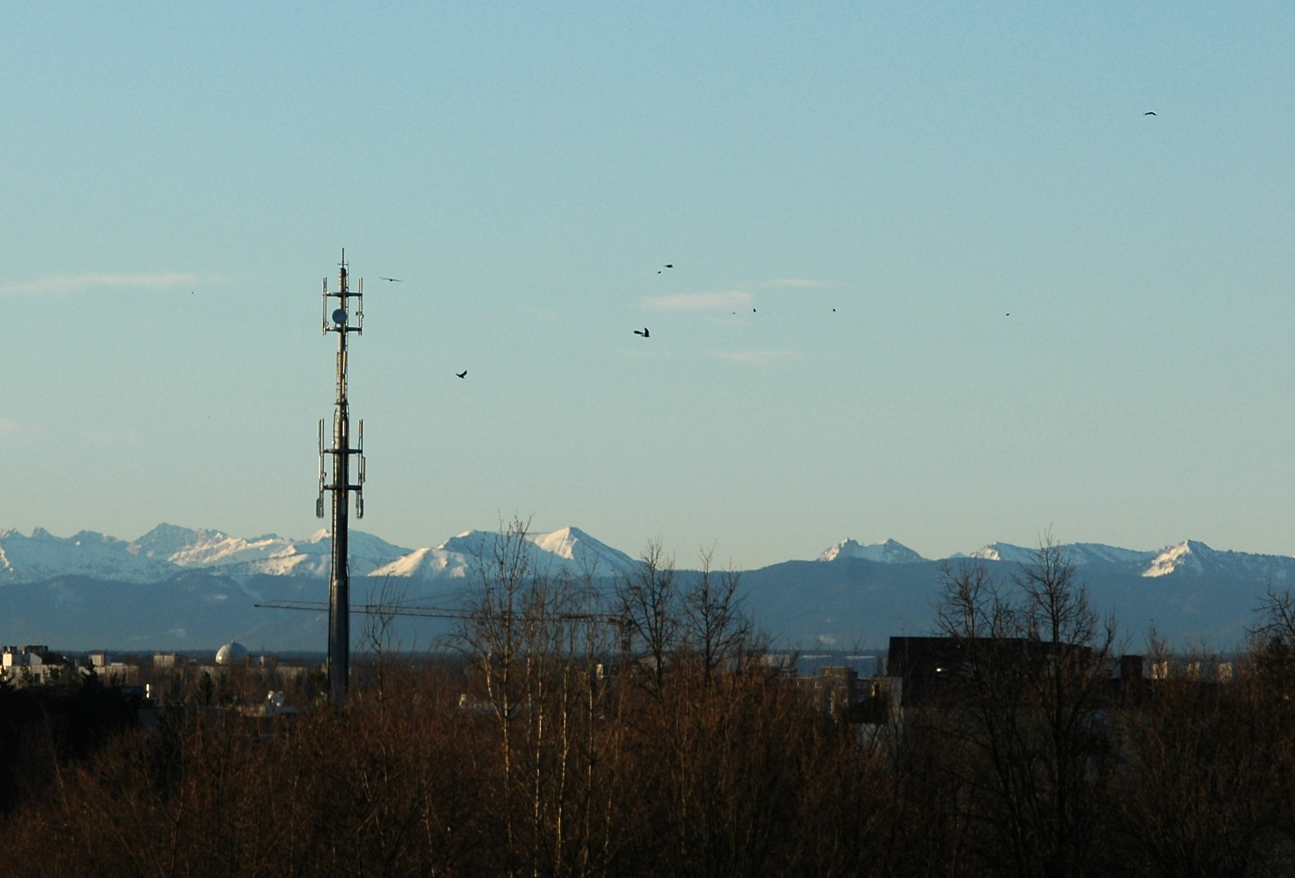 Mobilfunktmast_Alpenpanorama